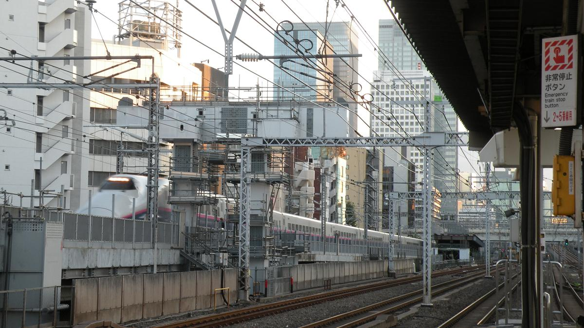 神田駅付近で進む東北縦貫線の高架建設工事